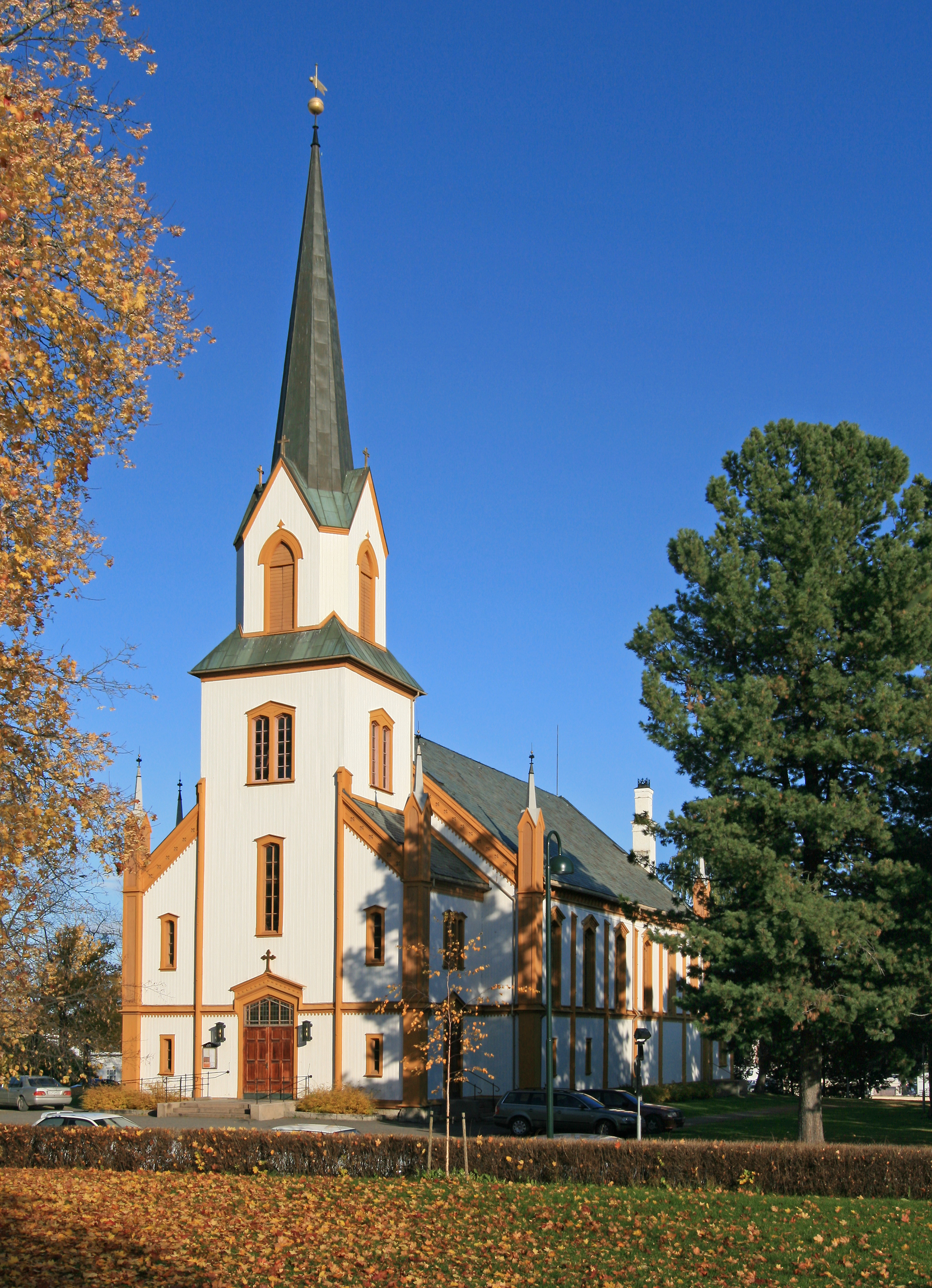 Gjøvik kirke.